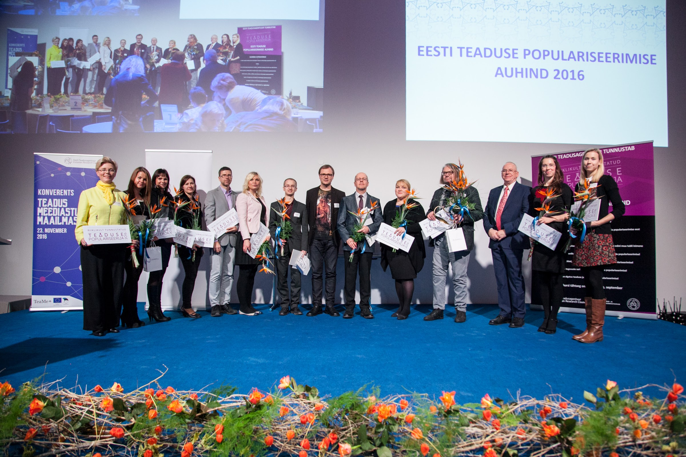 Riiklikult tunnustatud teaduse populariseerijad 2016. aasta teaduskommunikatsiooni konverentsil.